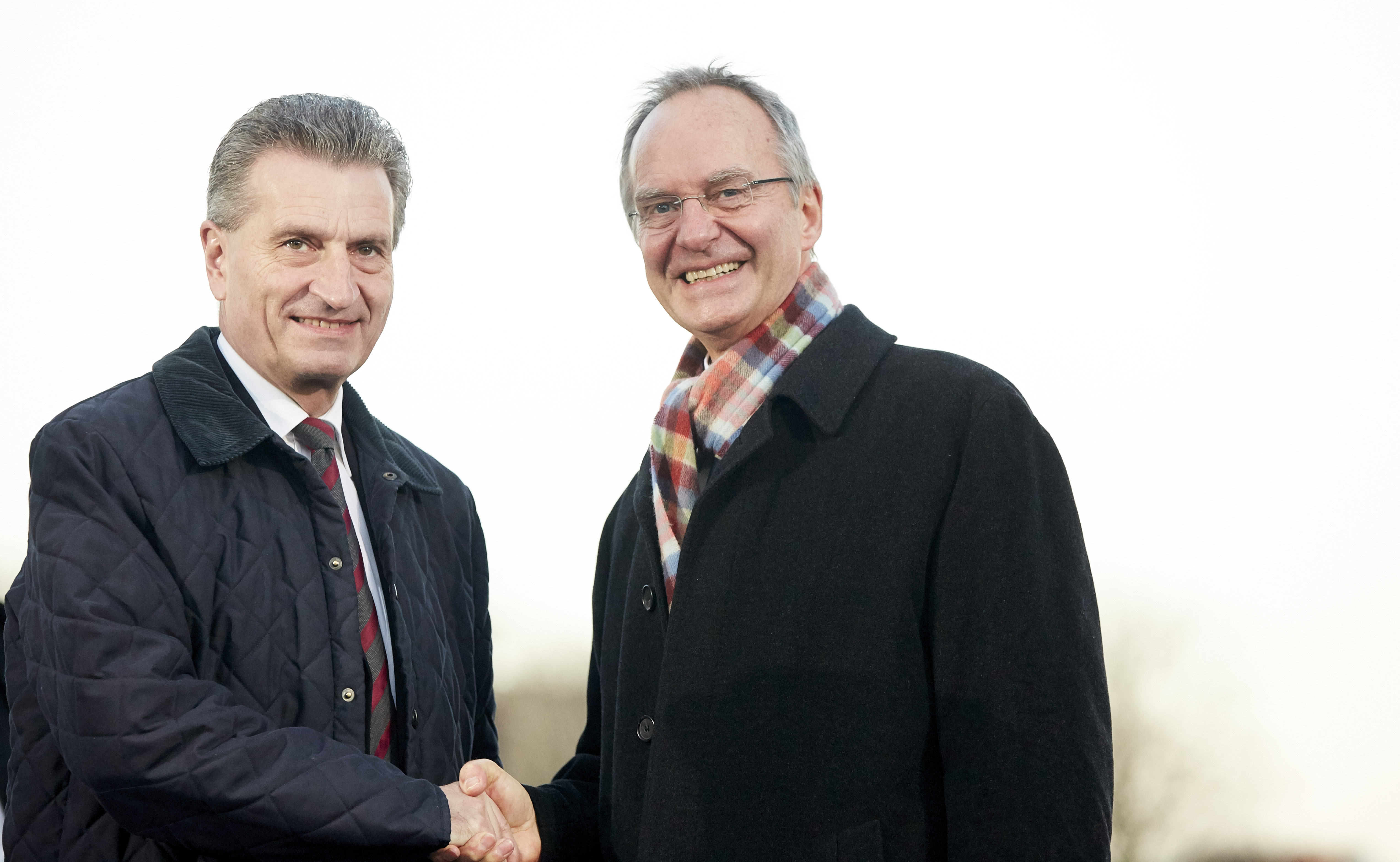 28 januari 2016 / Amsterdam, January 28th 2016. Aankomst van de minister voor de informele Bijeenkomst van de Ministers van Concurrentievermogen (Industrie en Interne Markt) met minister Henk Kamp van Economische Zaken (EZ). Arrival of the ministers for the informal meeting of Ministers responsible for Competitiveness (single market/industry) with minister Henk Kamp of Economic Affairs. Foto: Rijksoverheid/Martijn Beekman – Photograph: Dutch Government/Martijn Beekman